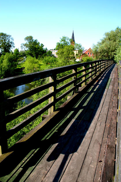 Drewniany most Kaszczorek-Złotoria (Toruń) (Poland)